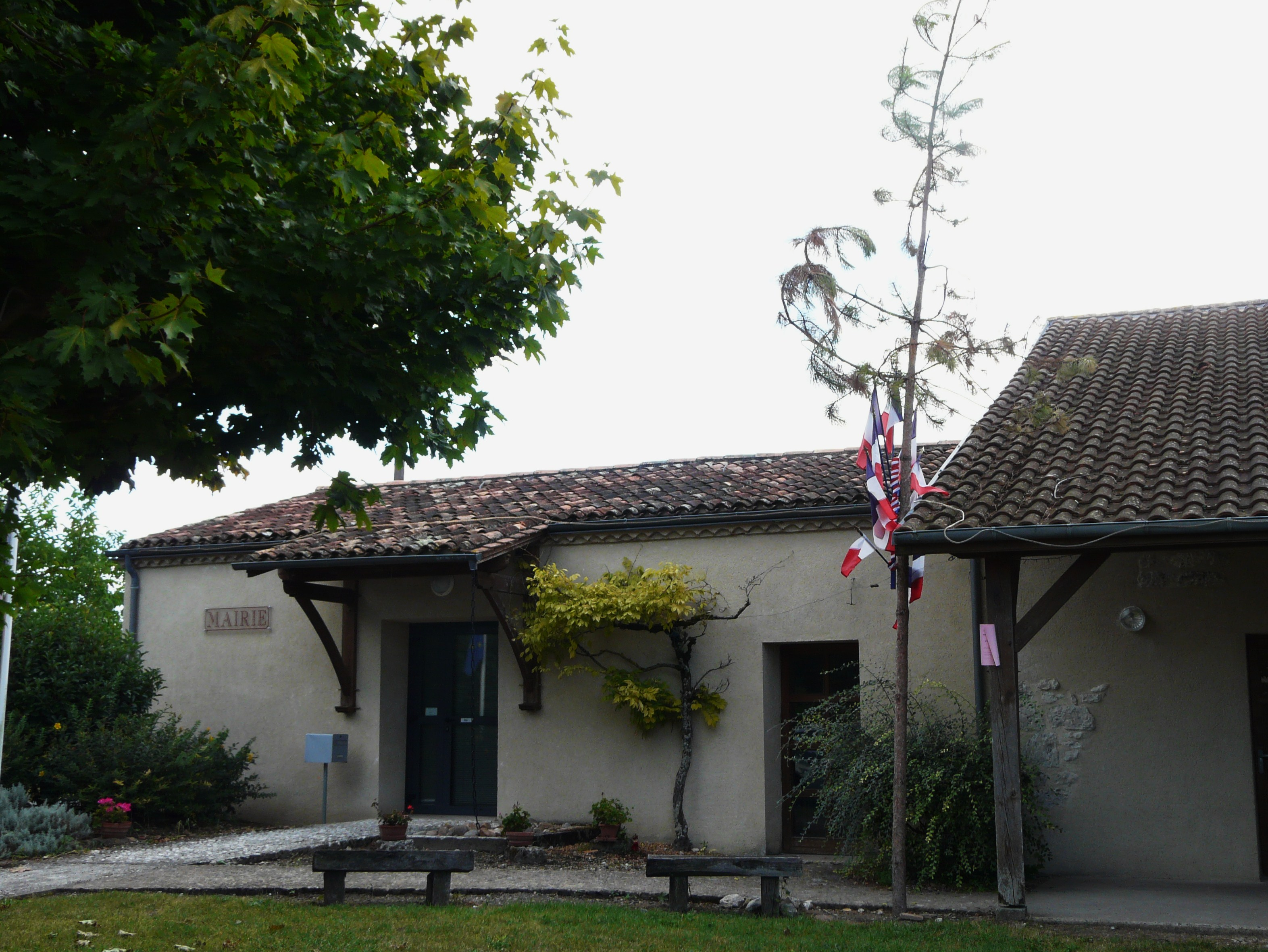 La mairie de Sadillac, Dordogne, France.